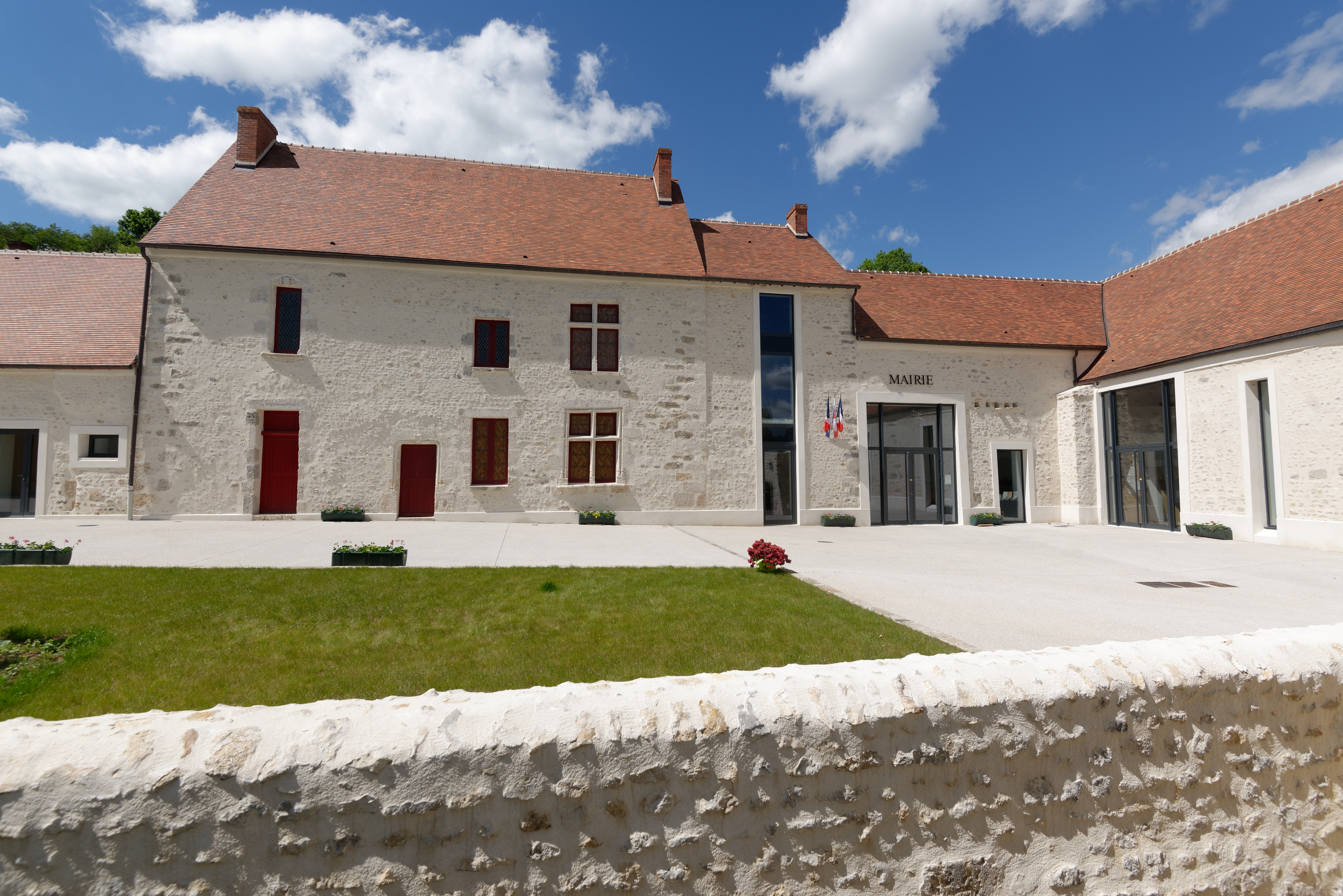 Mairie de Guillerval, dans l'Essonne.